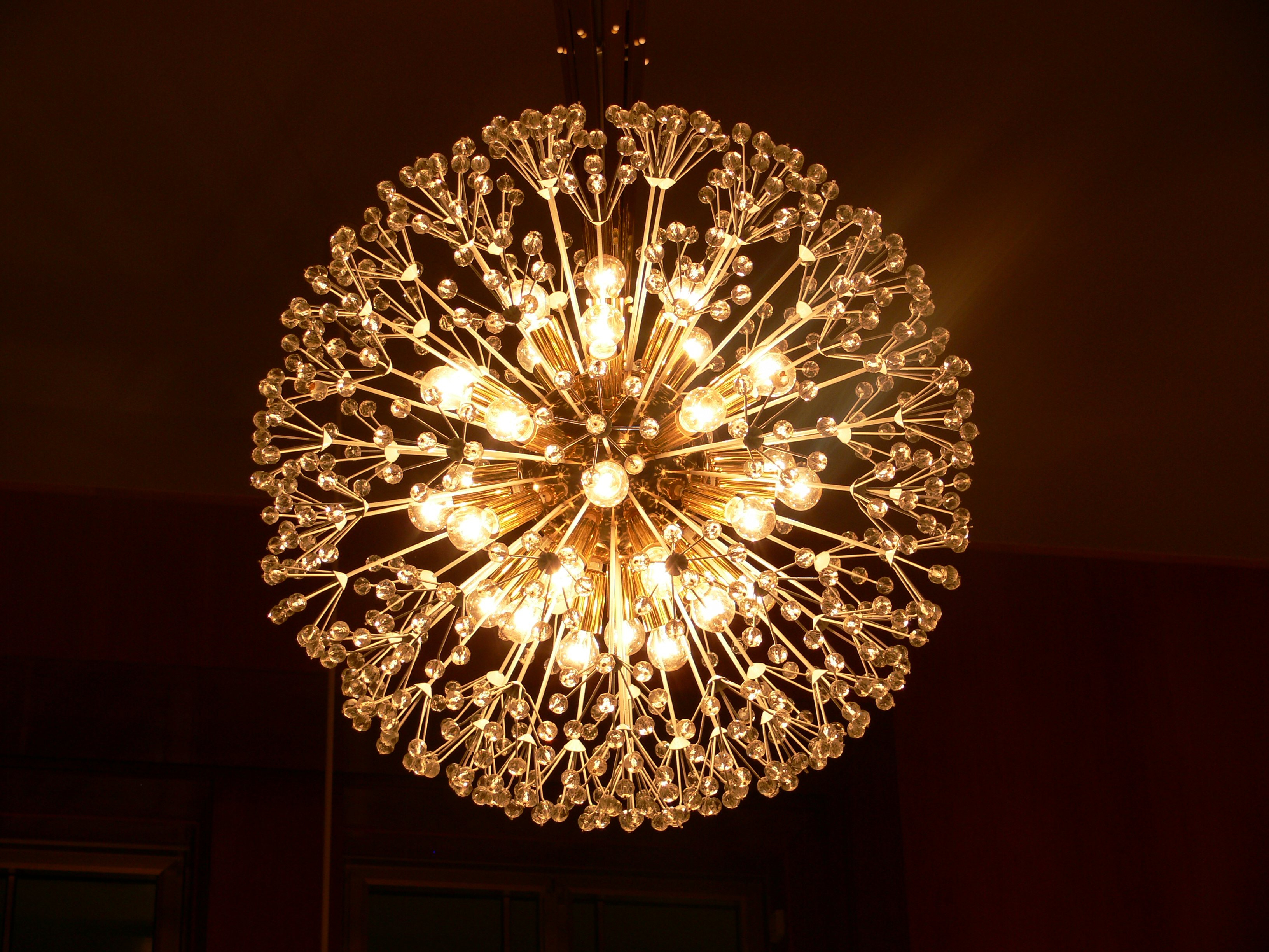 Opernhaus Leipzig, Lampe im Parkettfoyer